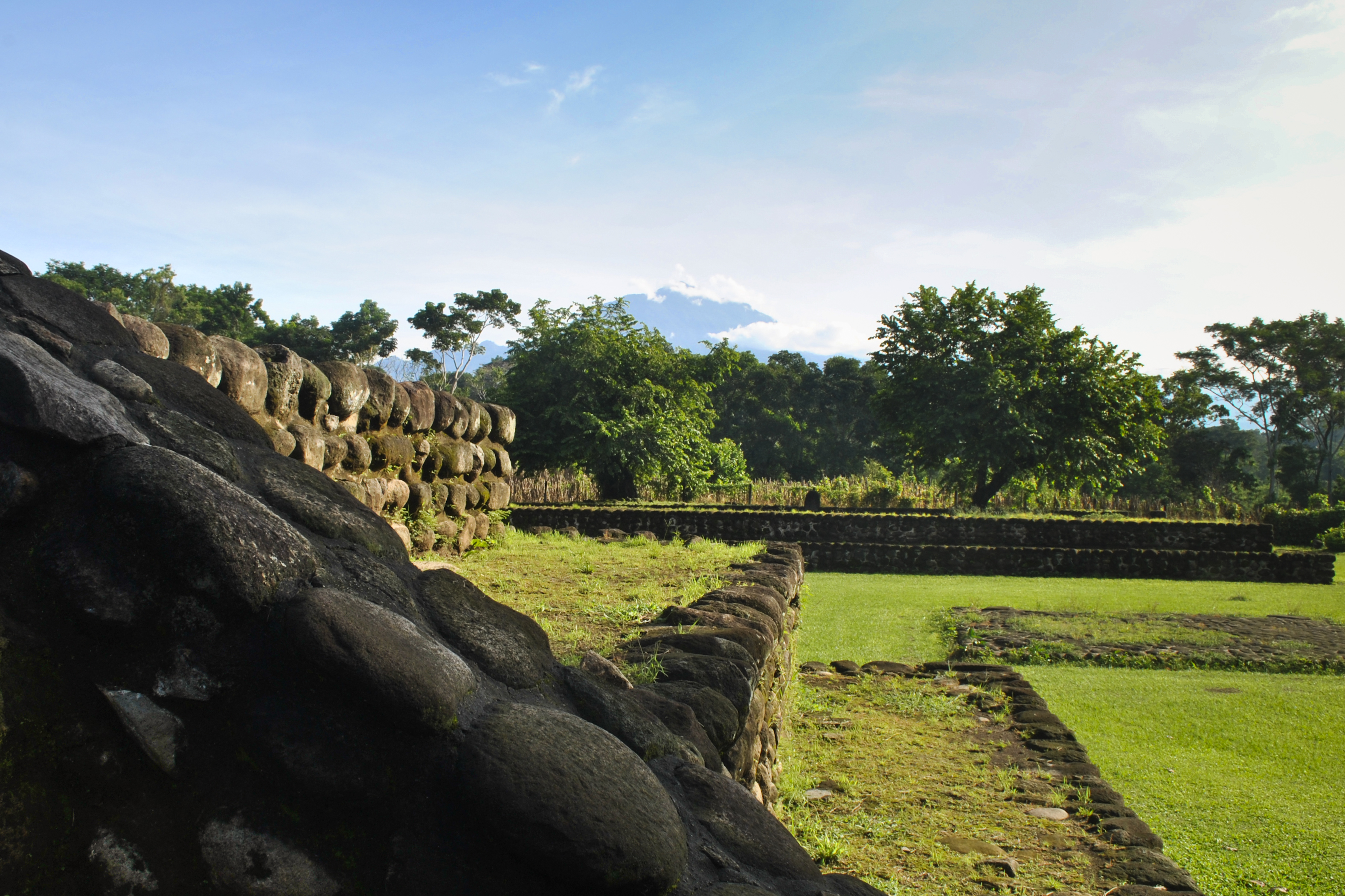 Izapa fue un centro cívico y religioso que fue construido alrededor del 1500 a. C. La cultura Izapeña fue influida por los Olmecas. Sin embargo, Izapa adquiere características propias que se difunden a otros lugares como la Costa de Chiapas y Guatemala.